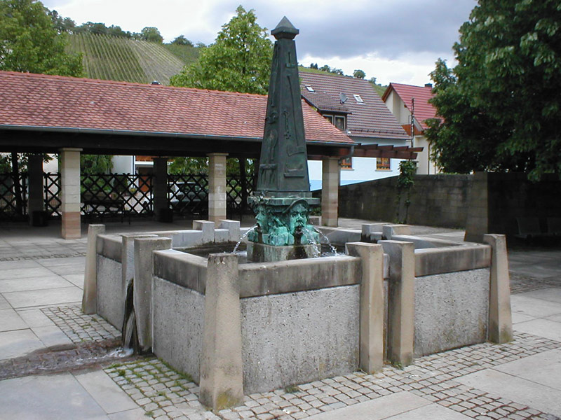 Brunnen auf dem Kirchplatz von Pfaffenhofen (Württ.), gestaltet von Gunther Stilling